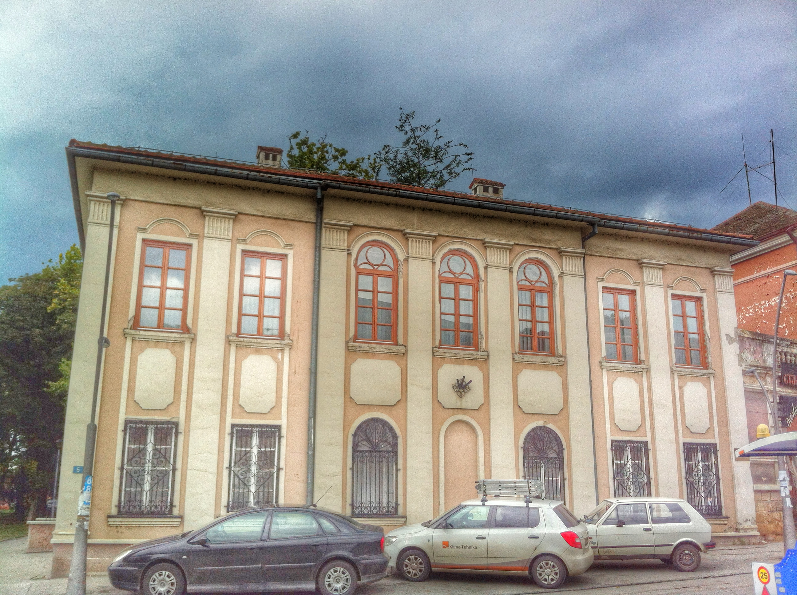 Српски (ћирилица): До 1955-е године на овом месту се налазило Среско Начелство, а до 1966-е Општина.